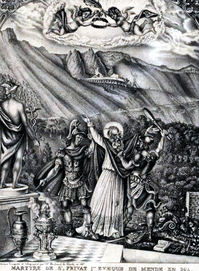 Gravure : Saint Privat se sacrifiant